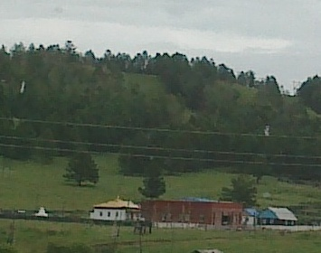 Бургултайский дуган